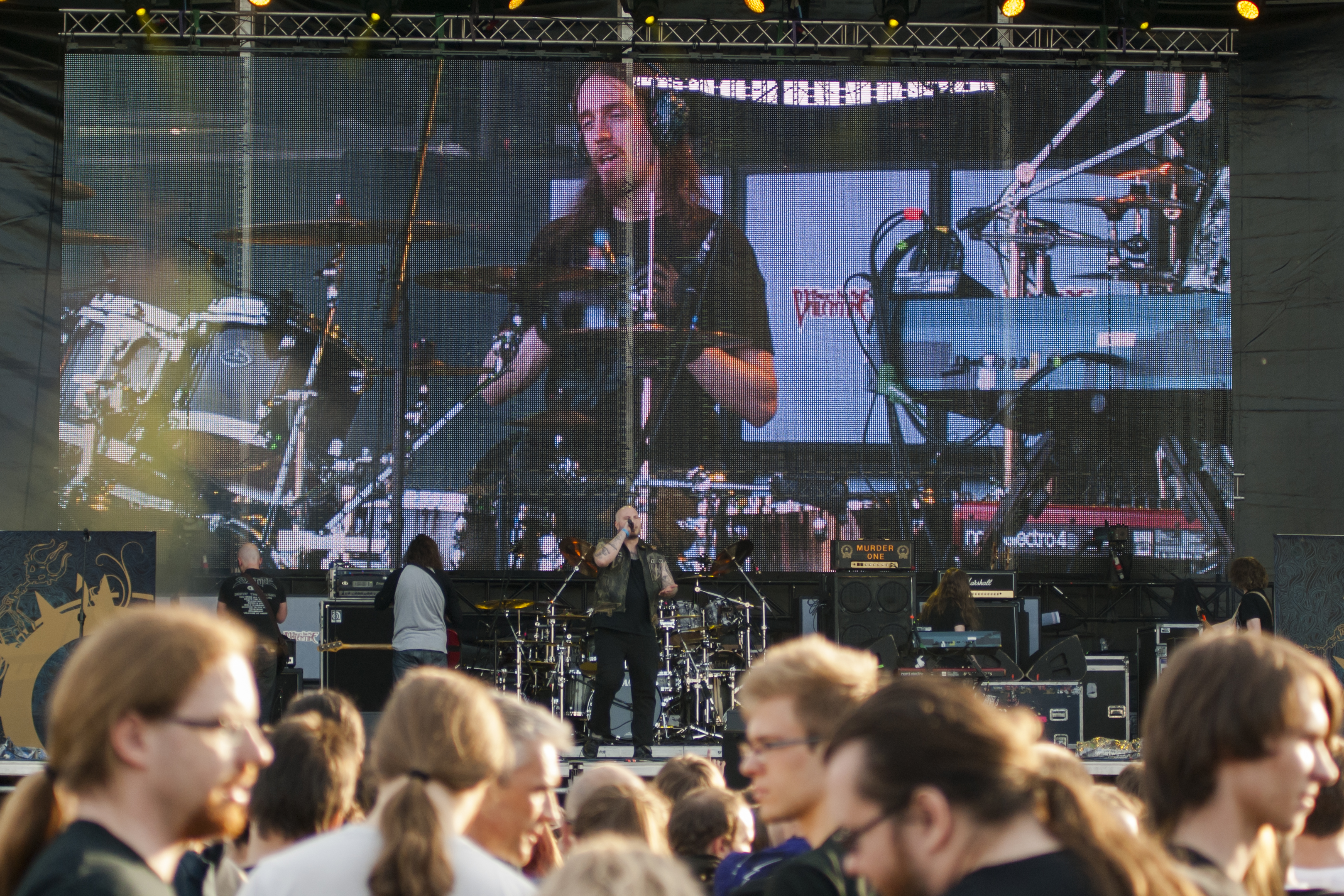 Zespół Soilwork podczas festiwalu Ursynalia 2013